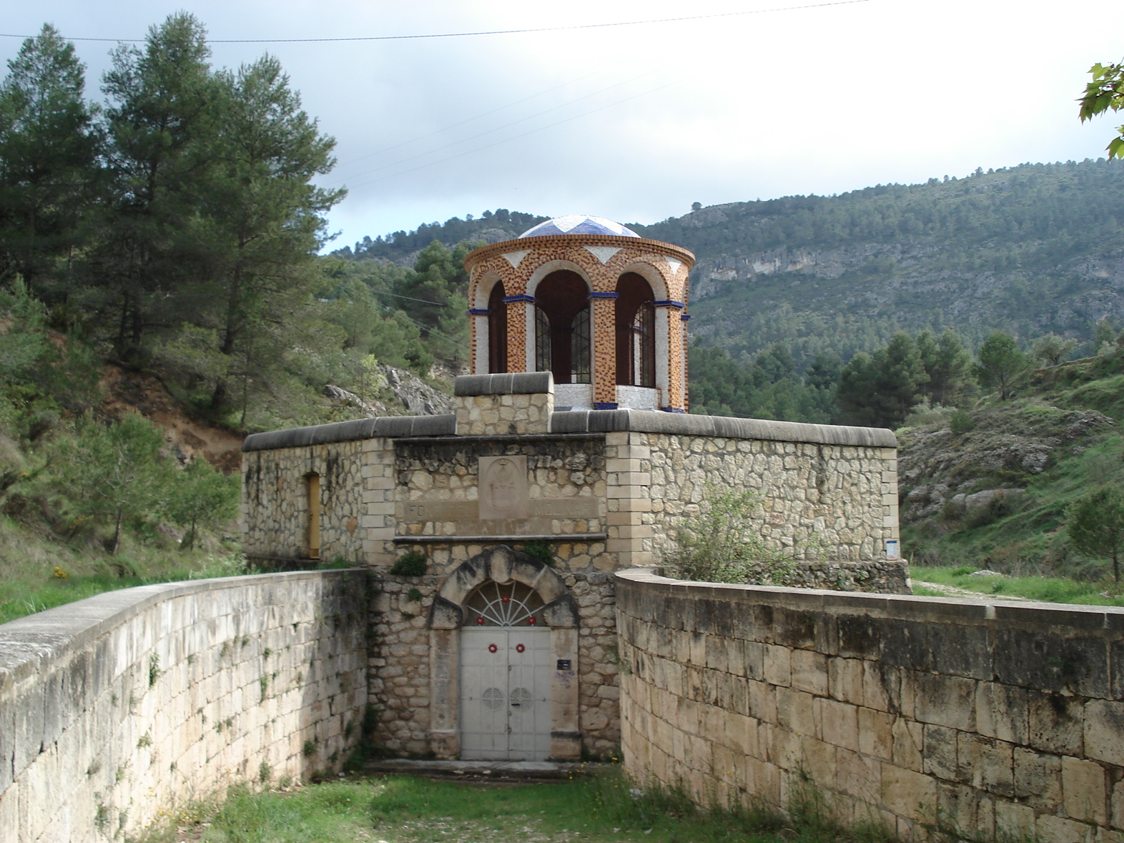 Edificio modernista de 1912 que se encuentra en el conjunto BIC de "El Molinar", en Alcoy (Alicante, España.